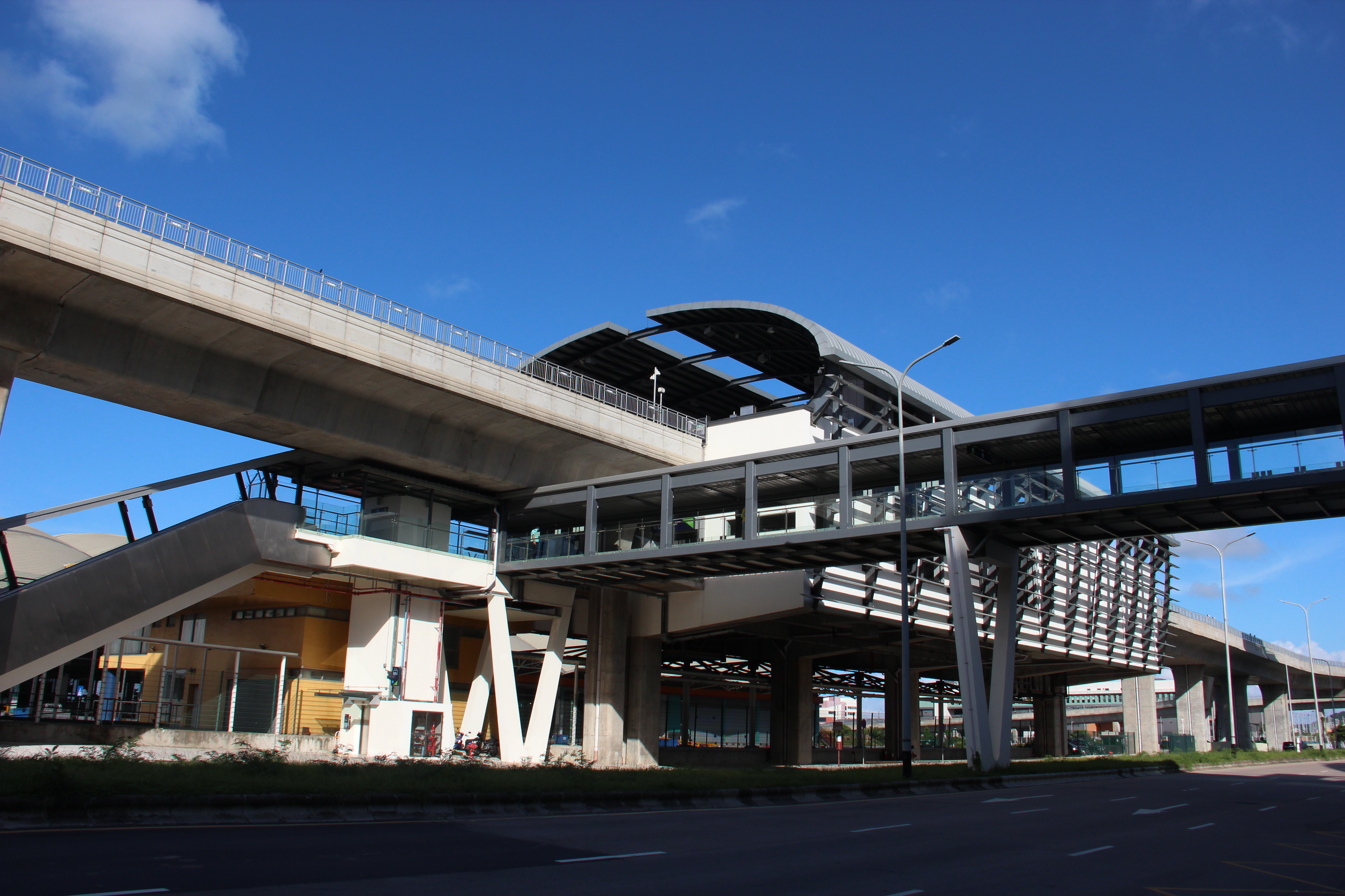 中文（香港）: 澳門輕軌科大站站體結構